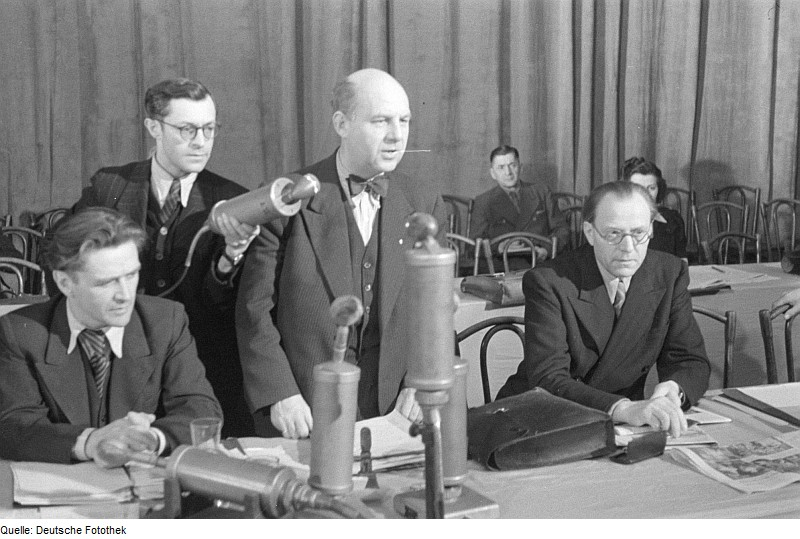 Original image description from the Deutsche Fotothek Admiralspalast, Deutsche Staatsoper Berlin & Gebäude der russischen Kommandantur in Berlin-Pankow